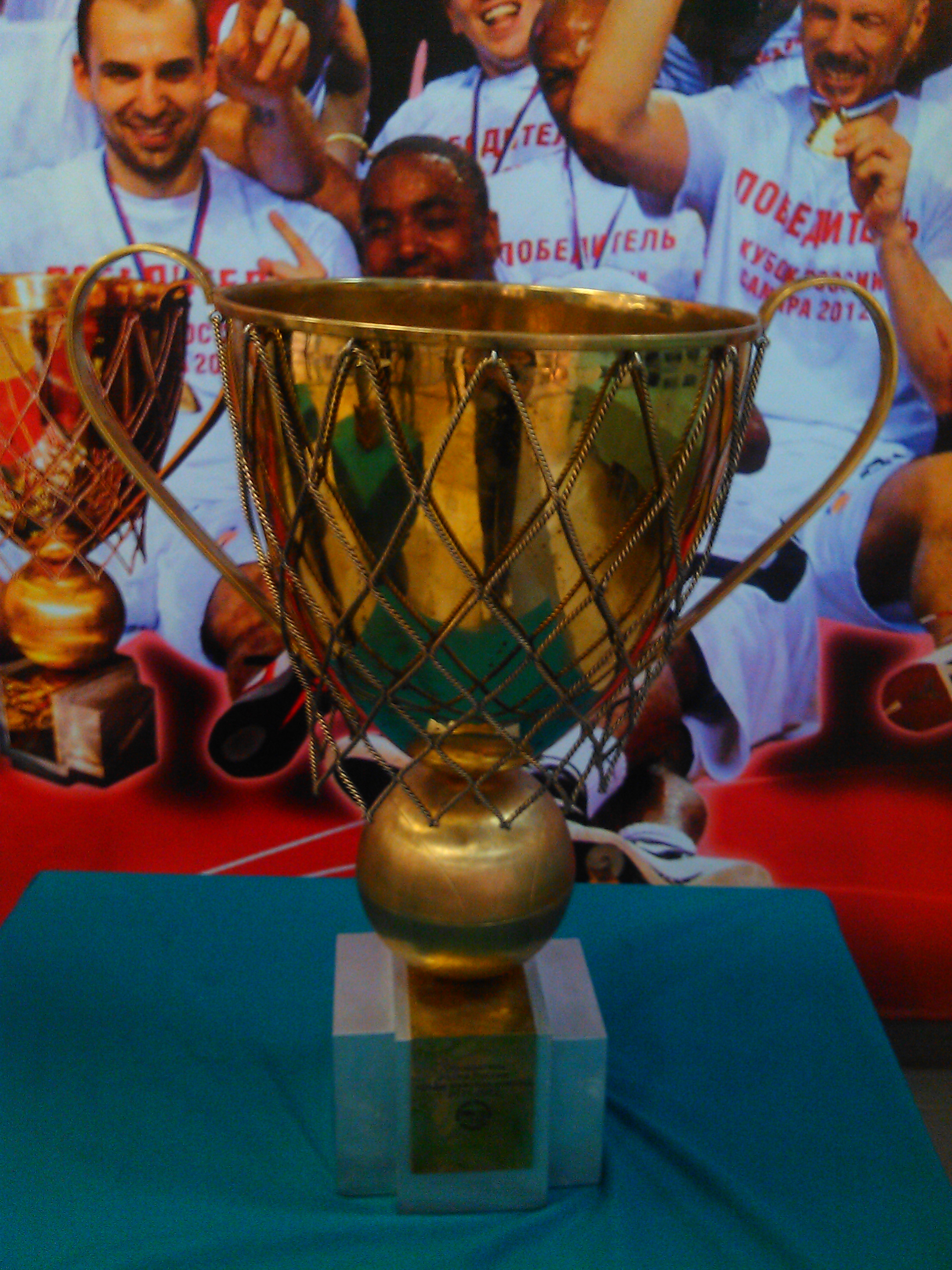 Кубок России по баскетболу 2011-2012 в спортивном комплексе МТЛ-Арена в Самаре.